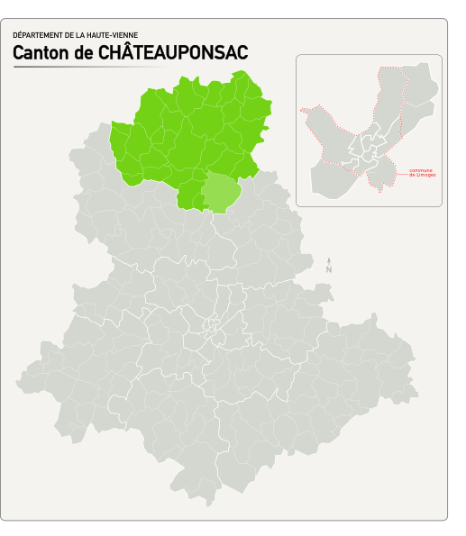 Carte du nouveau canton de Châteauponsac.